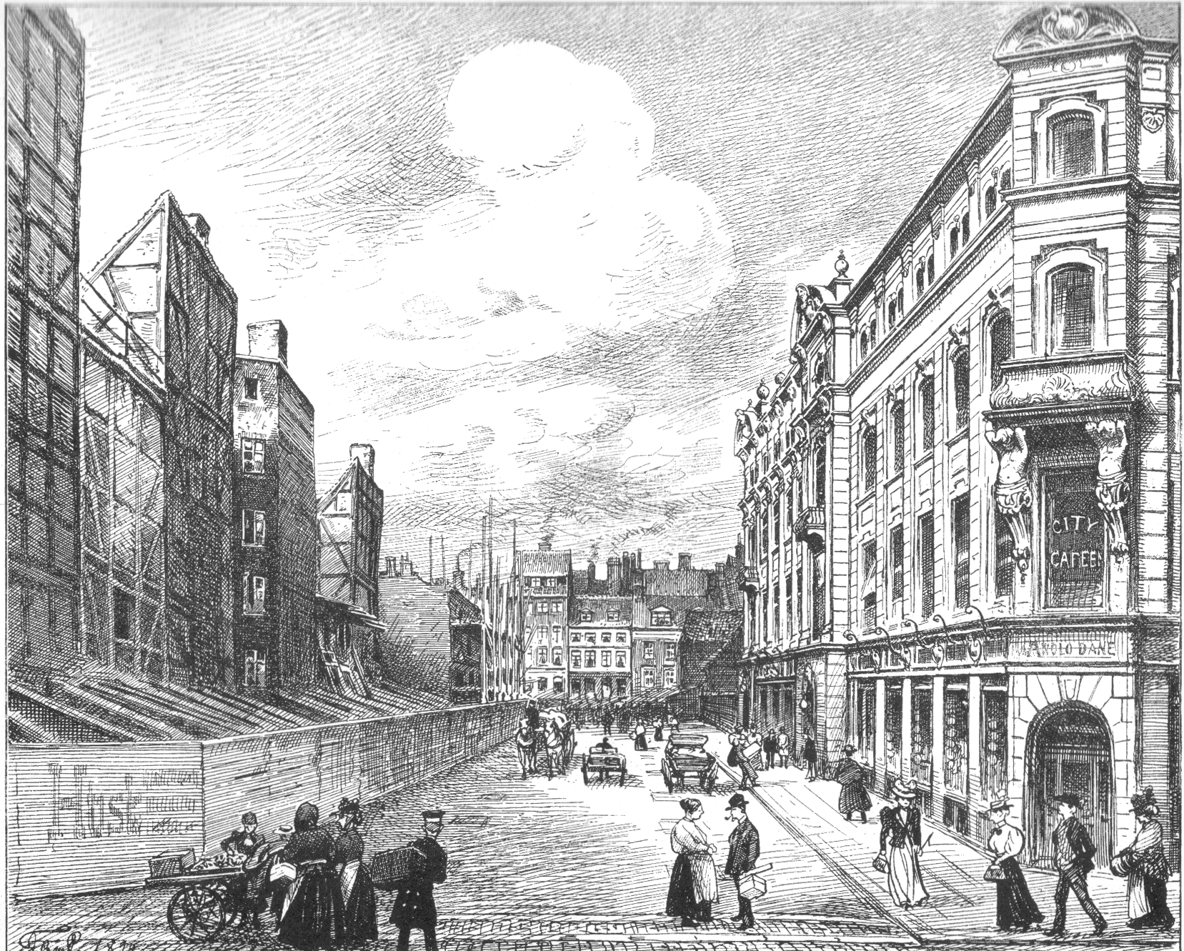 Citygade anlægges over en Del nedrevne Bygningers Grund mellem Pilestræde og Christenbernikovstræde og er Led i en større Plan, der tilsigter en vidtrækkende Ombygning af denne gamle Del af Byen.